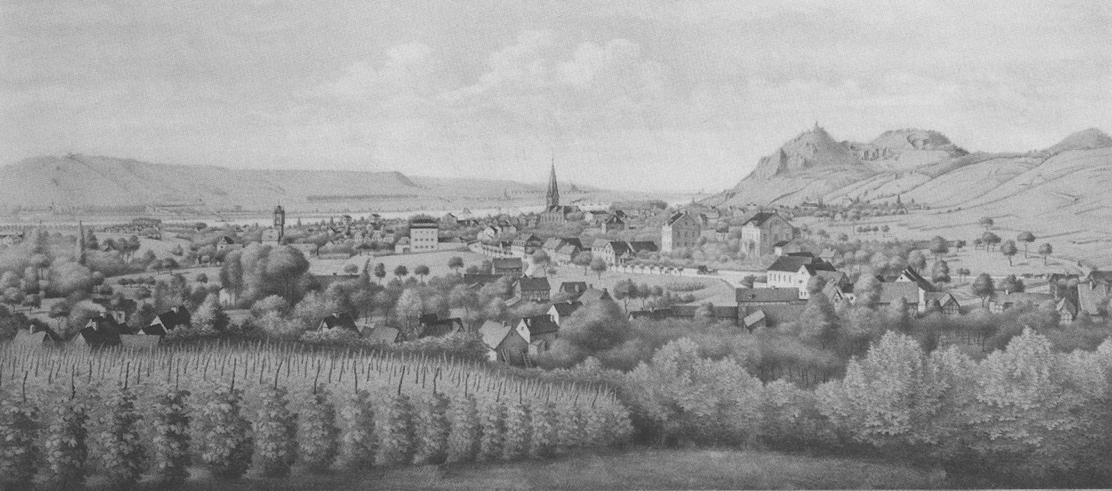 Blick über die Weinberge von Selhof nach Honnef auf den Drachenfels, Lithographie von August Karstein